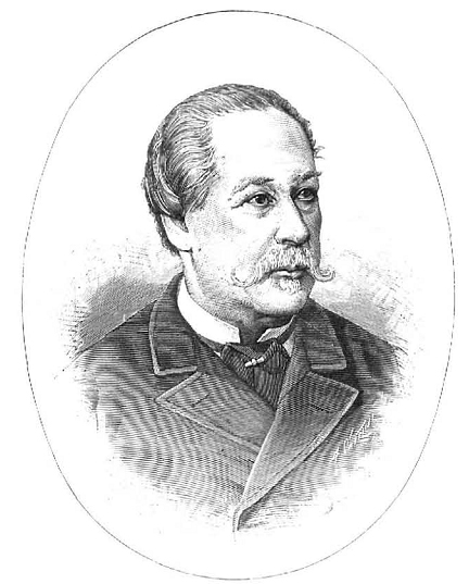 Excmo. Sr. D. Ramón Torres Muñoz de Luna, doctor en Ciencias y Farmacia, catedrático de Química en la Universidad Central, en la revista española La Ilustración Española y Americana.